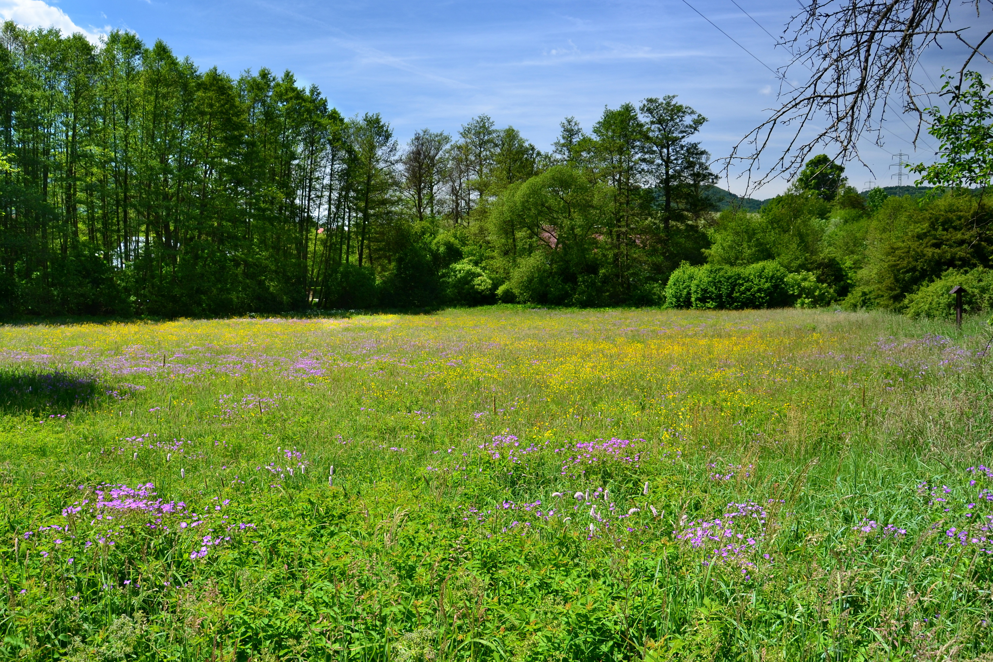 Severní část louky